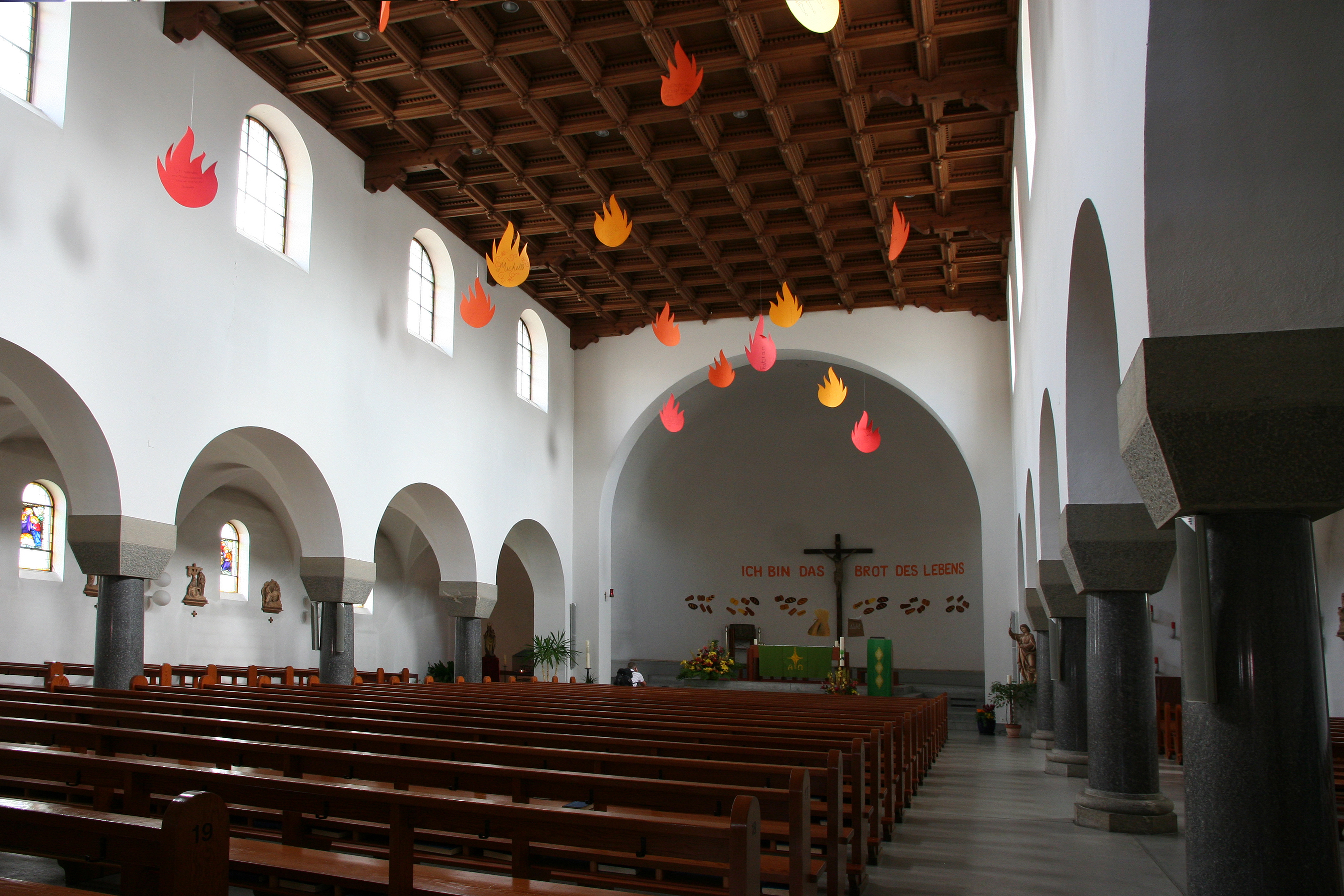 Römisch-katholische Pfarrkirche St. Margareten Wald, Innenansicht